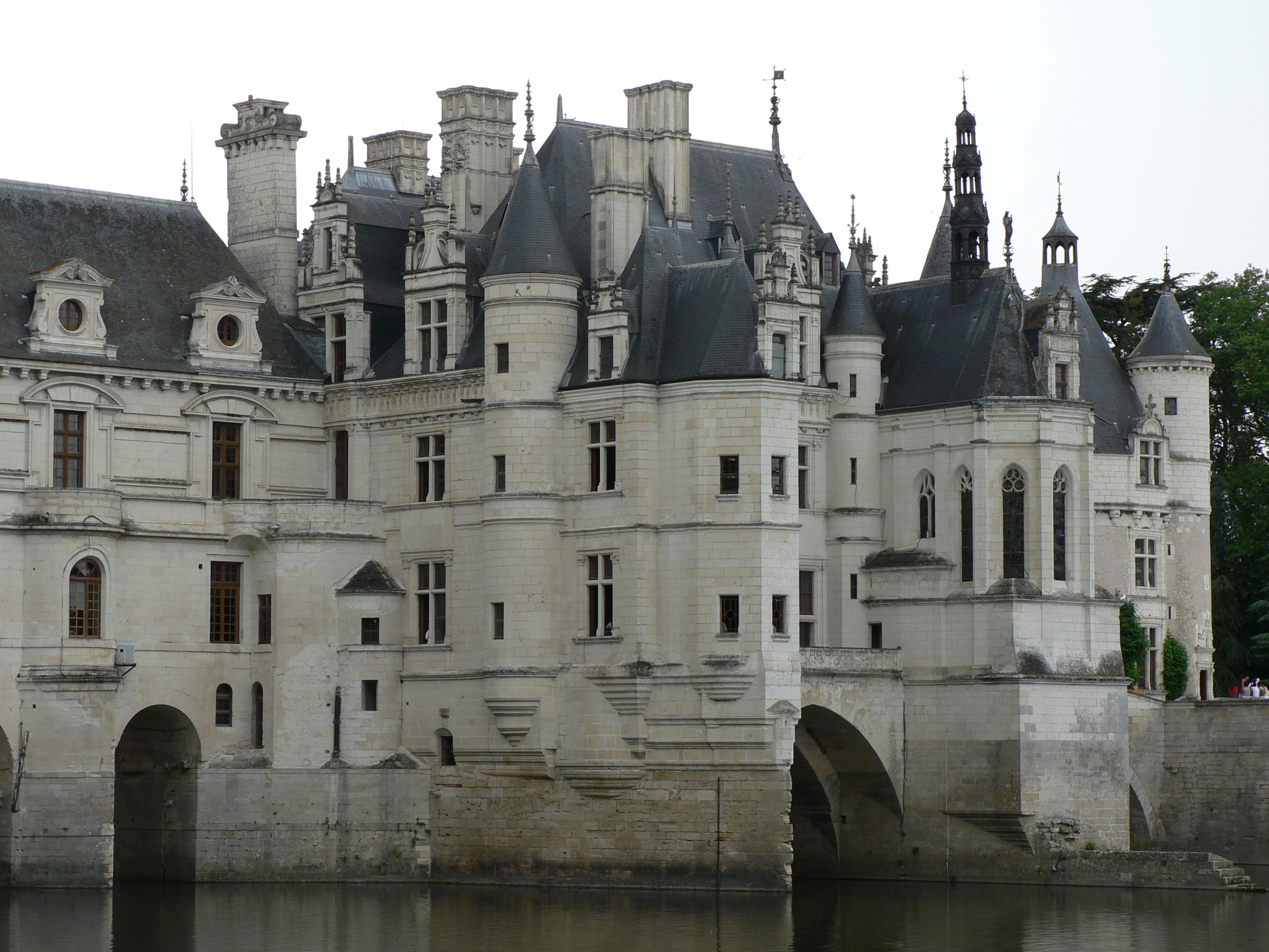 Le Château de Chenonceau